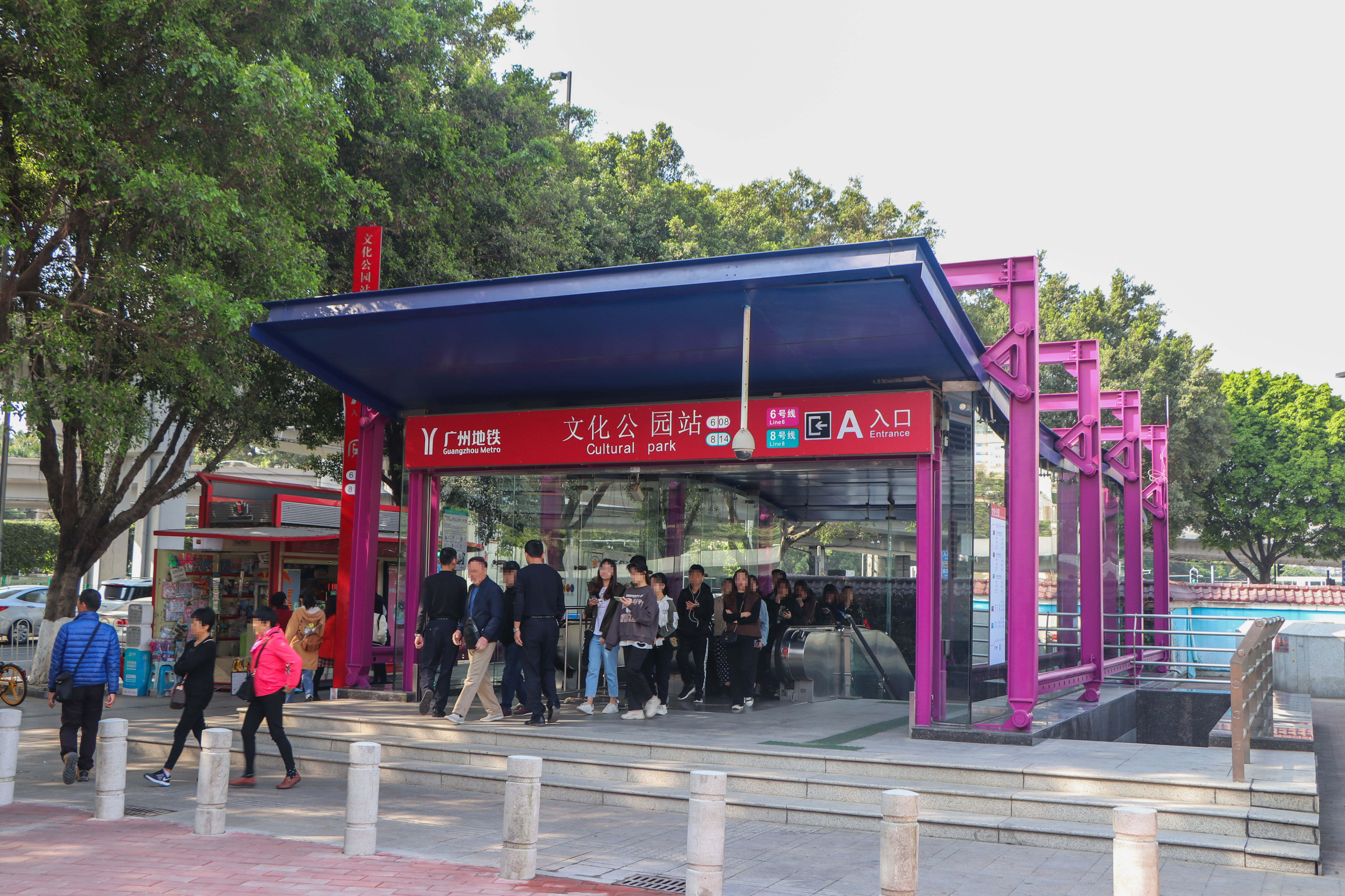 广州地铁文化公园站